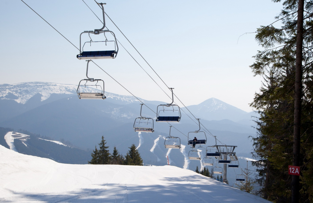 Подъёмник курорта Буковель